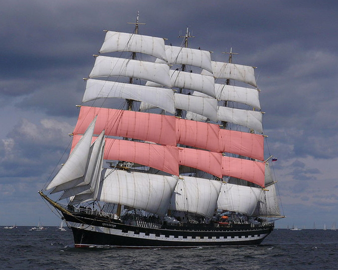 Марсели Крузенштерна